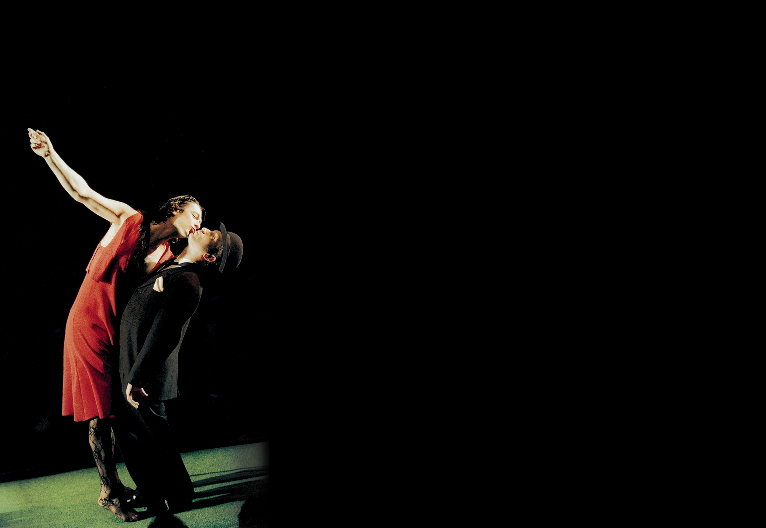 רוזנקרנץ וגילדנשטרן מתים בתיאטרון גשר